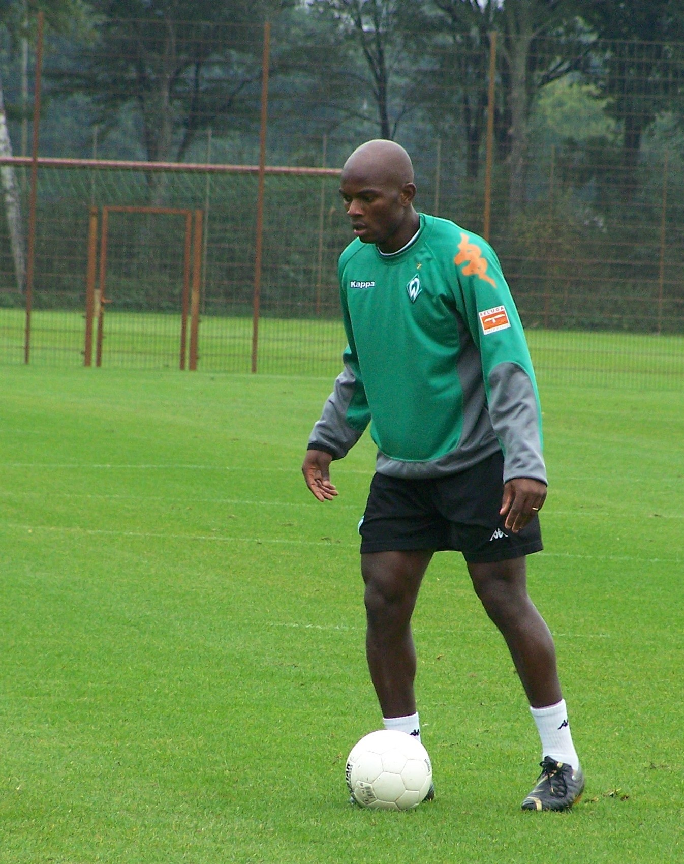 Pierre_Womé